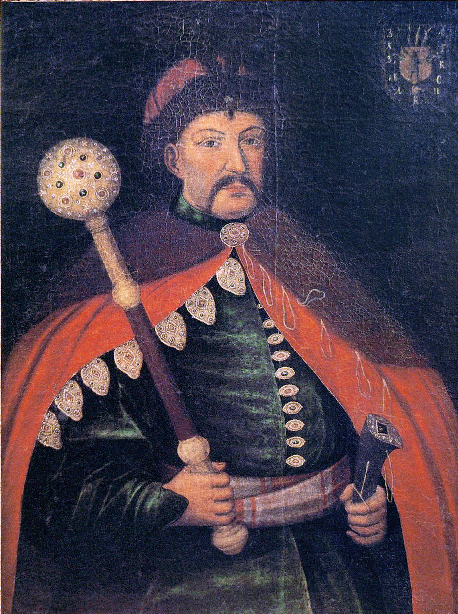 Портрет Богдана Хмельницького